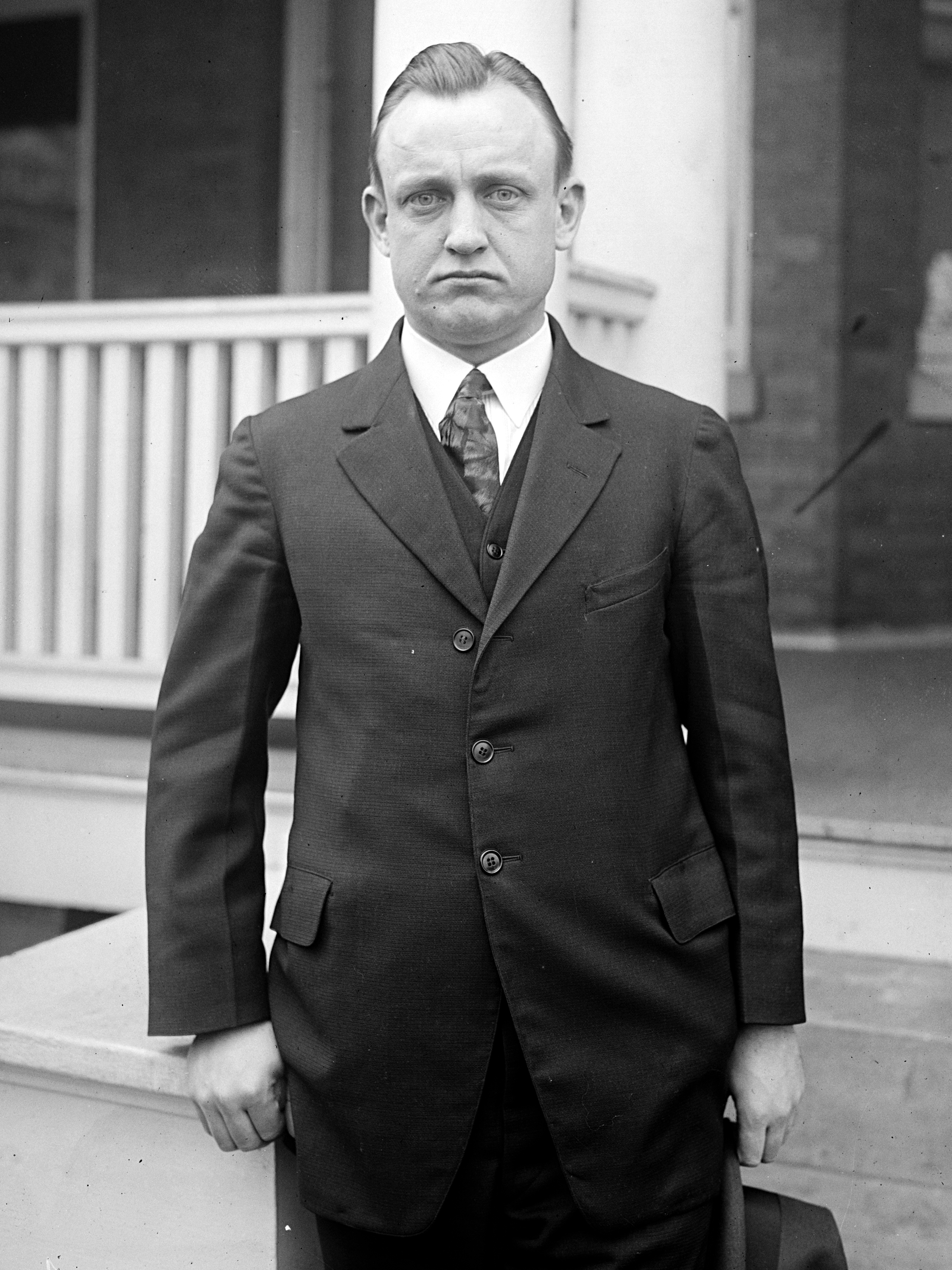 Everett Kent, US Representative from Pennsylvania